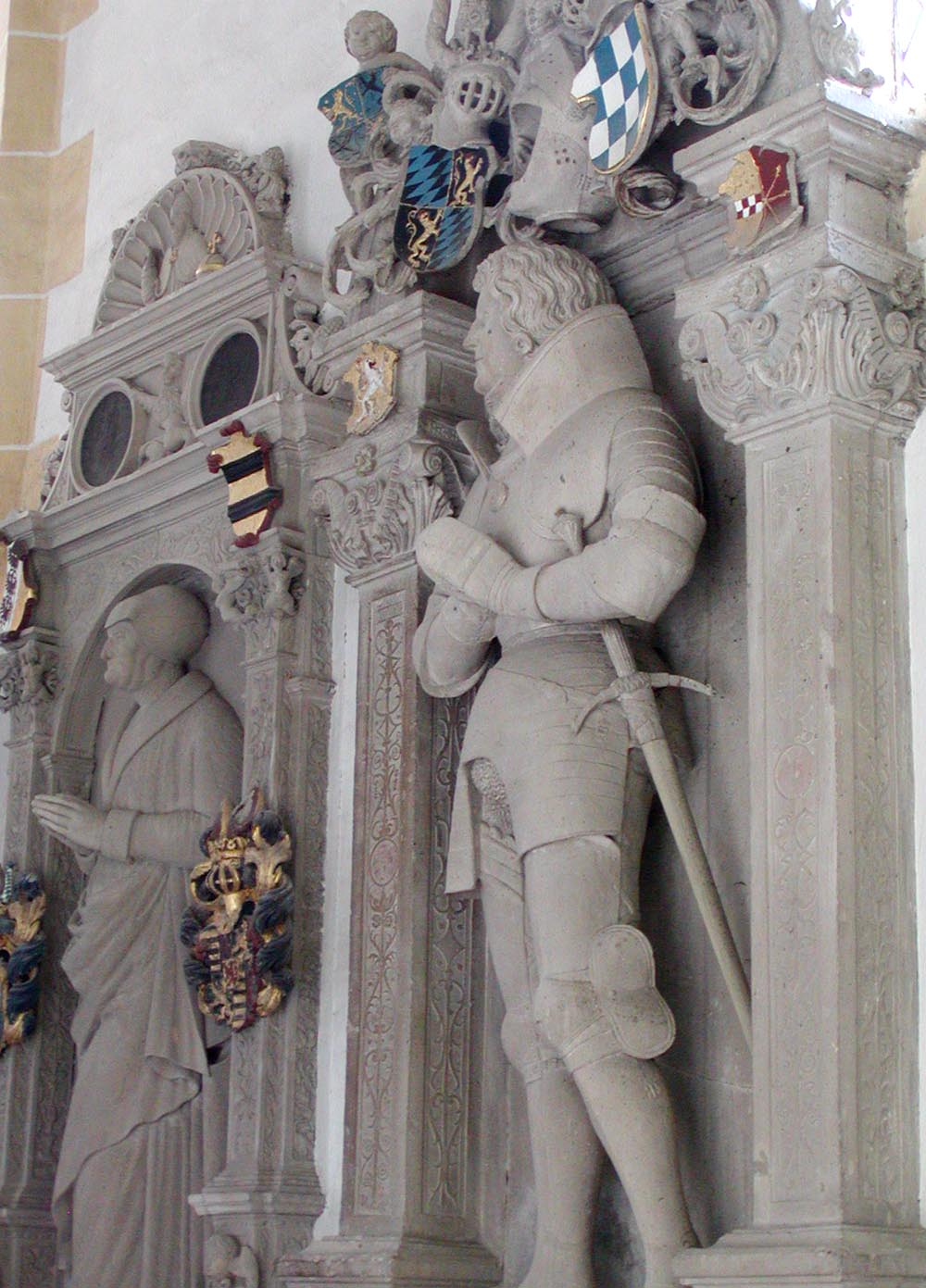 Simmern, Stephanskirche, Epitaphe der Herzogin Johanna von Pfalz-Simmern (1464 - 1521) (Tochter Johanns II. von Nassau-Saarbrücken und Johannas von Loon-Heinsberg) und ihres Ehemannes, des Herzogs Johann I. von Pfalz-Simmern (1459 - 1509)